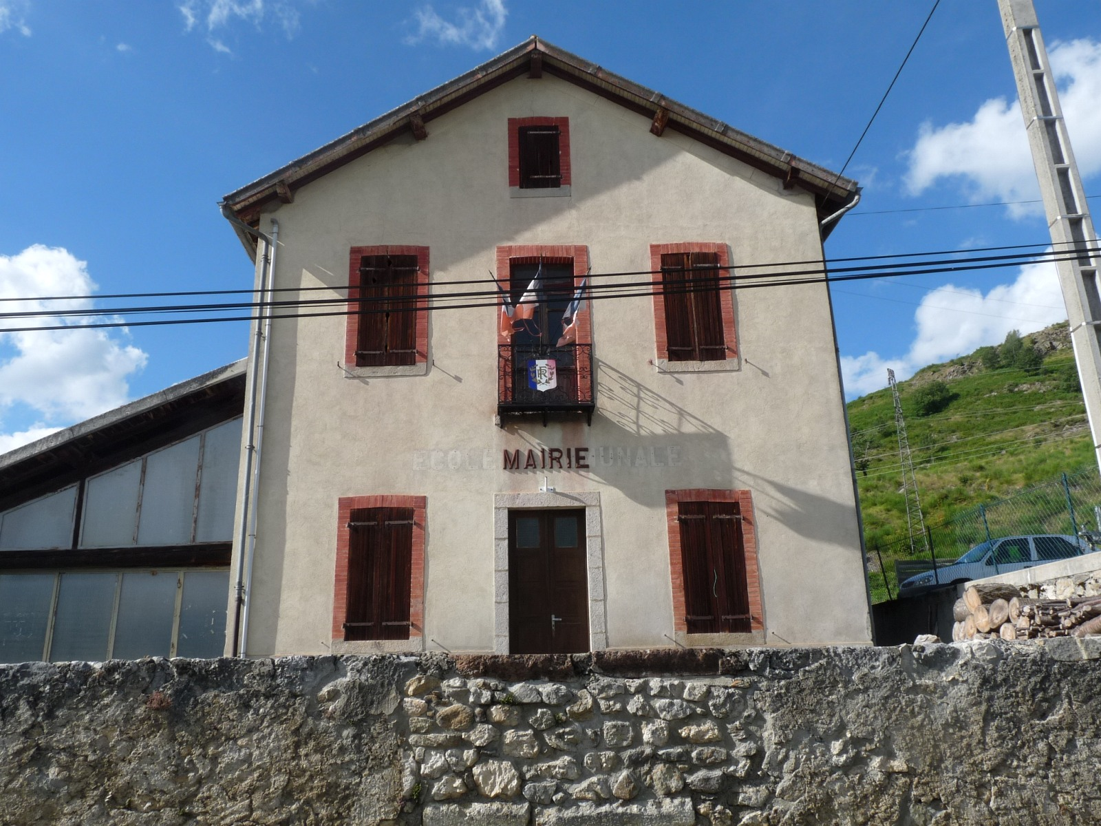 Mairie de Caychax, Ariège, France